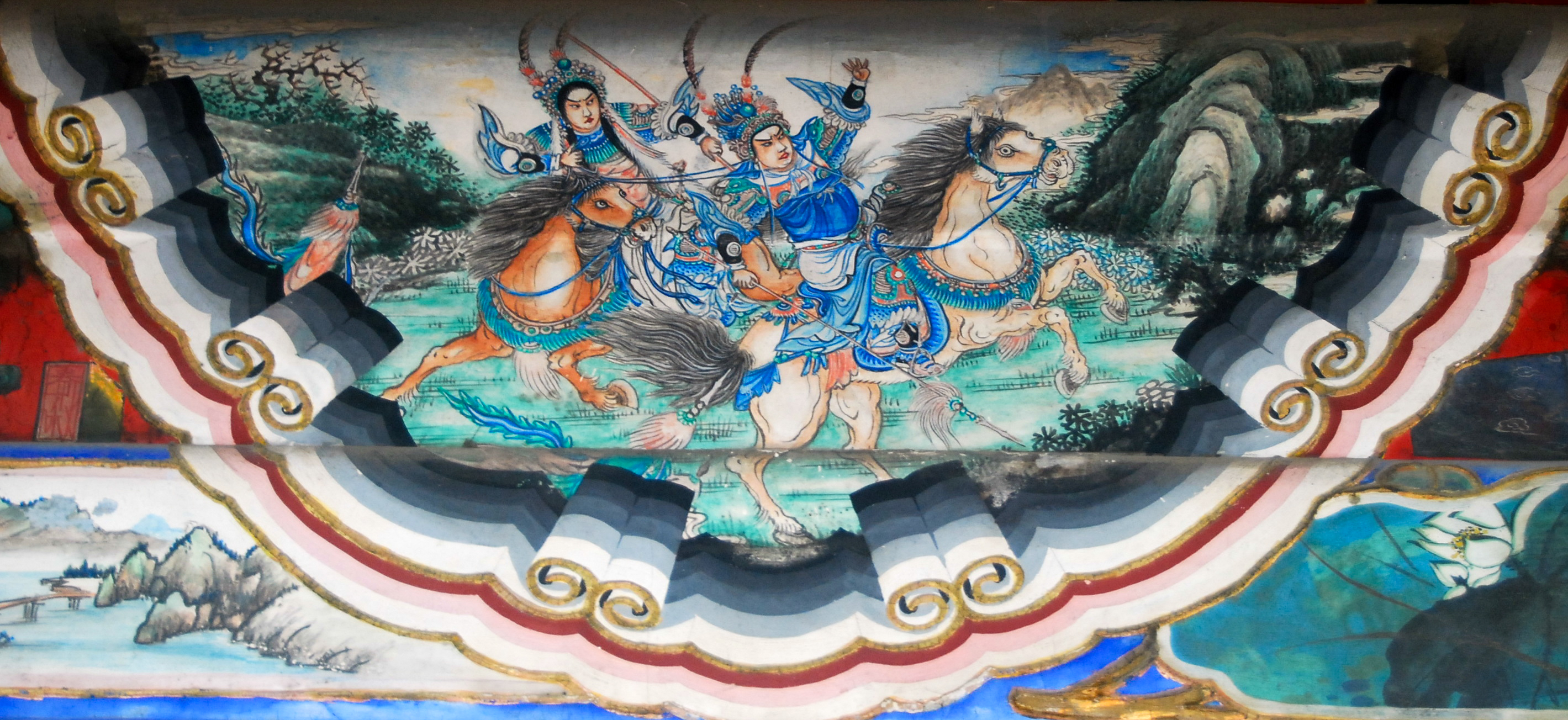 颐和园长廊彩绘：穆桂英招亲（穆桂英飞索捉杨宗保）